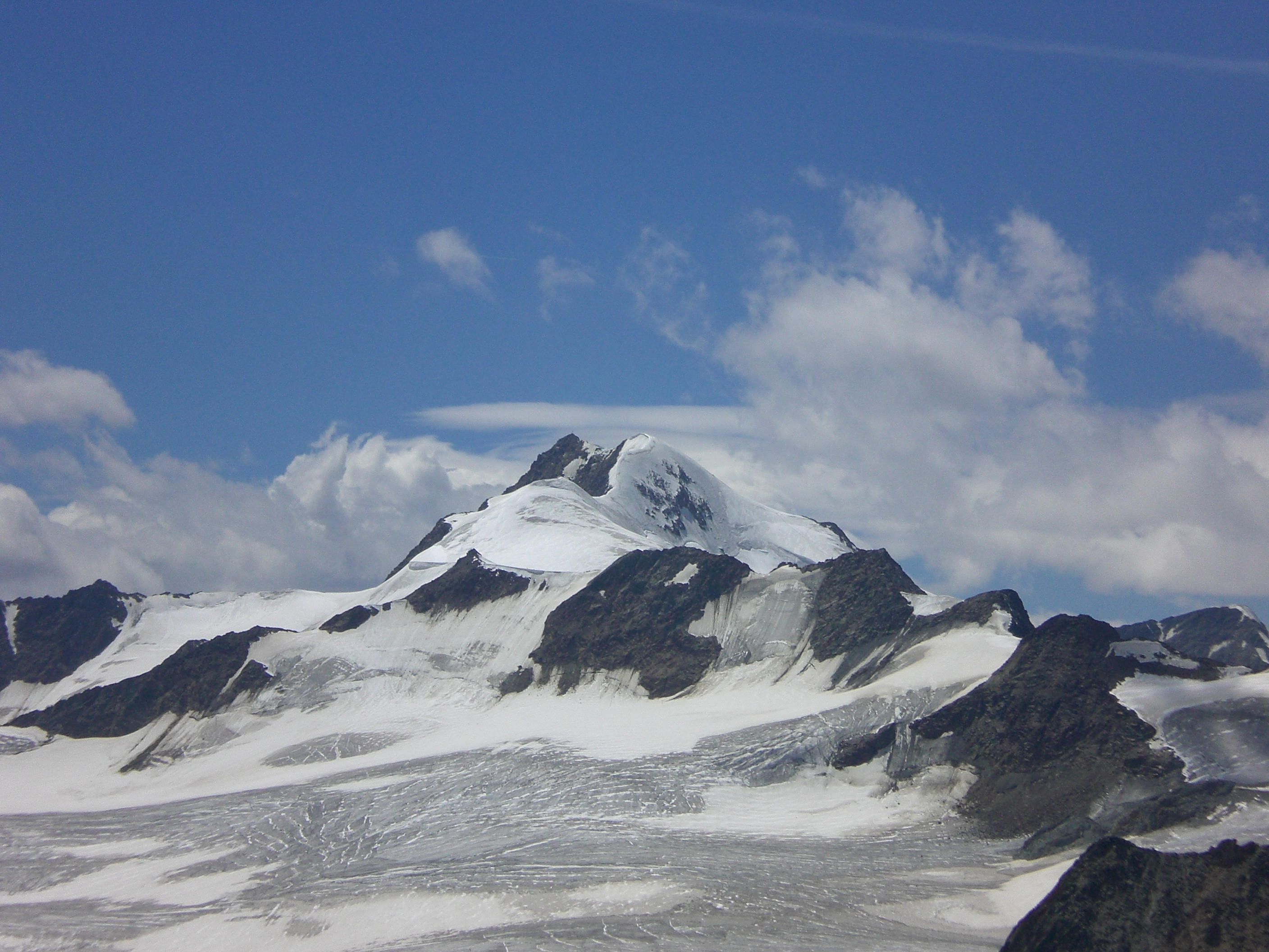 De Wildspitze, 3774m is de hoogste berg van Tirol en de op één na hoogste van Oostenrijk.